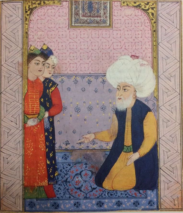 Lamii Çelebi'nin bilinen tek minyatürüdür. Âşık Çelebi, Meşāʿirü ş-şuʿarā, Fatih-Millet Kütüphanesi 447, 153a.